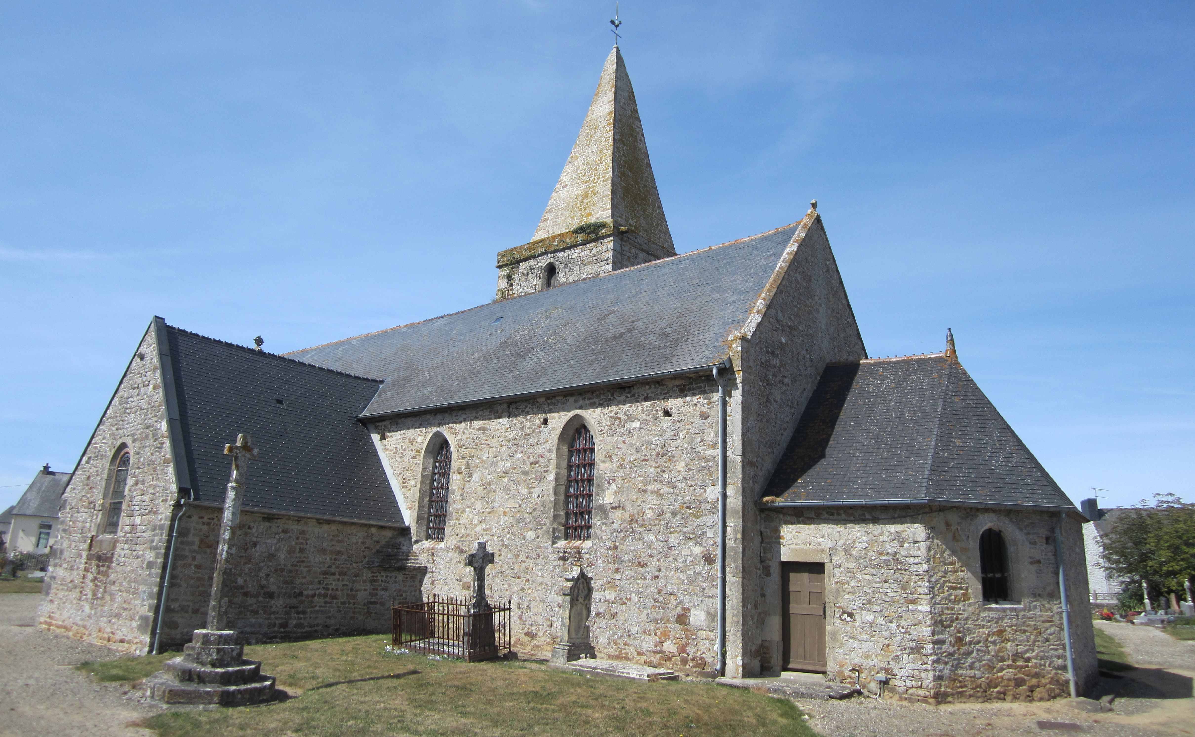 Saint-Maurice-en-Cotentin